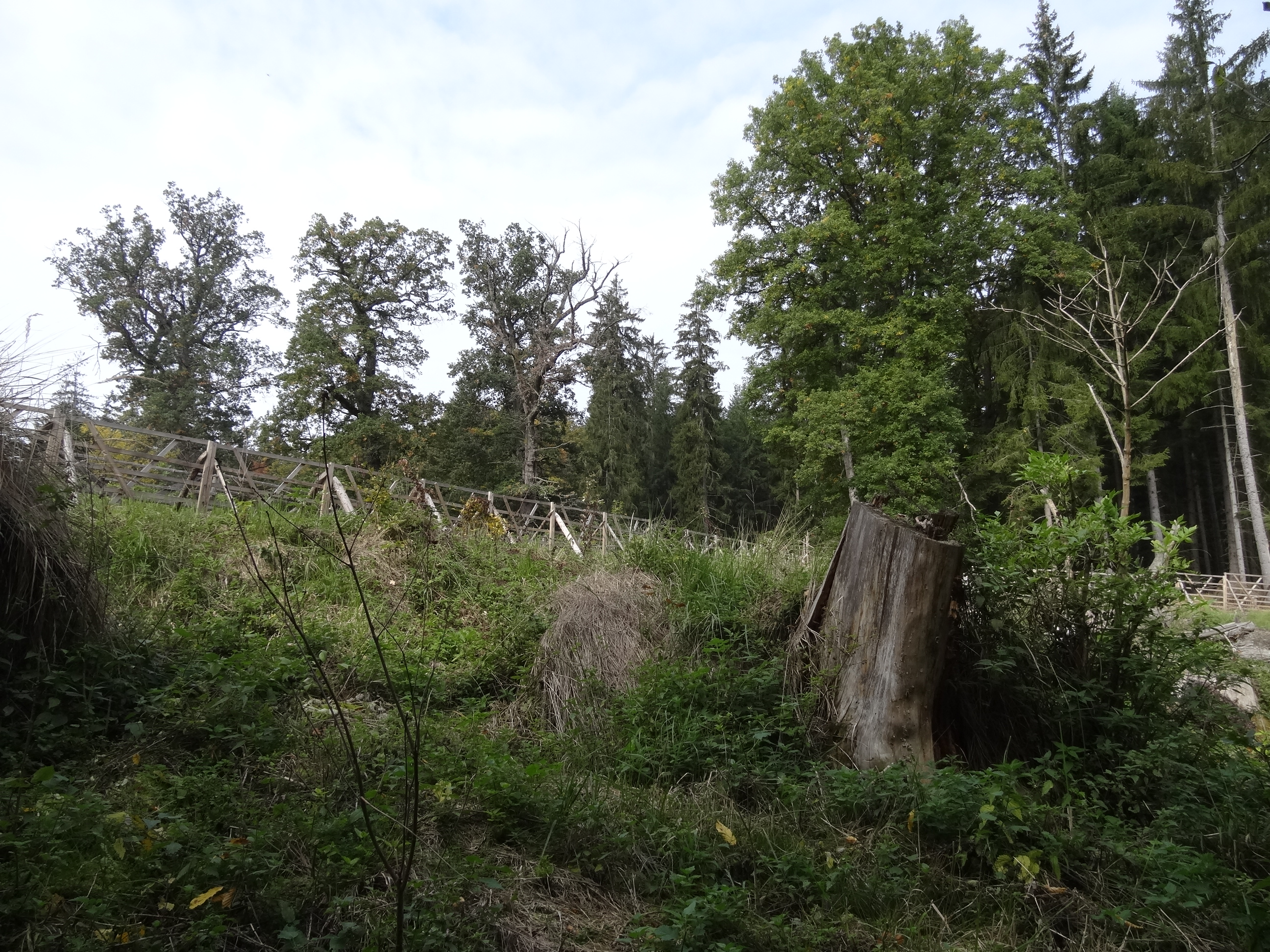 PP Kameník (ve Staré oboře u Hluboké nad Vltavou) - jihovýchodní cíp chráněného území